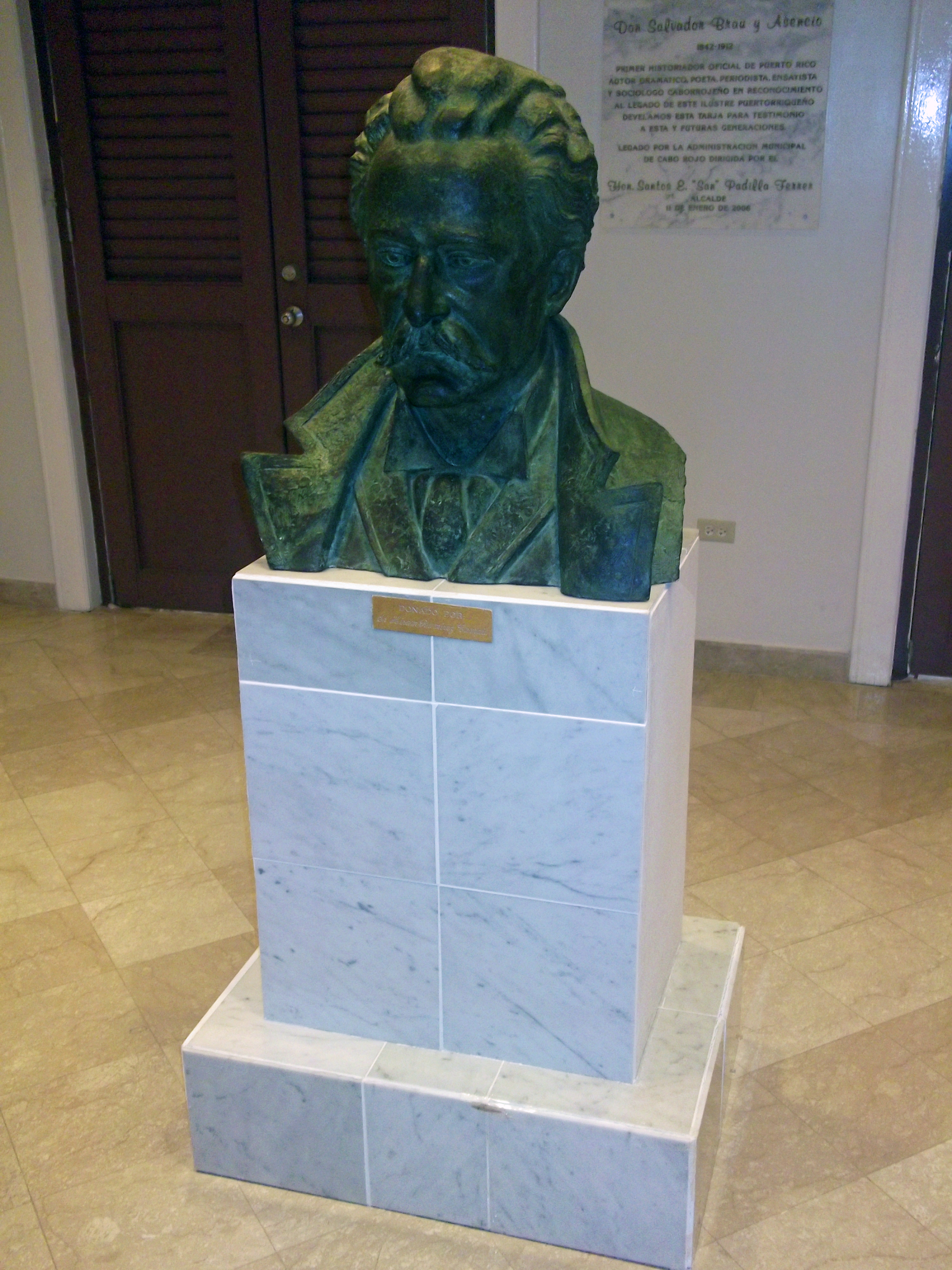 Busto de Salvador Brau.